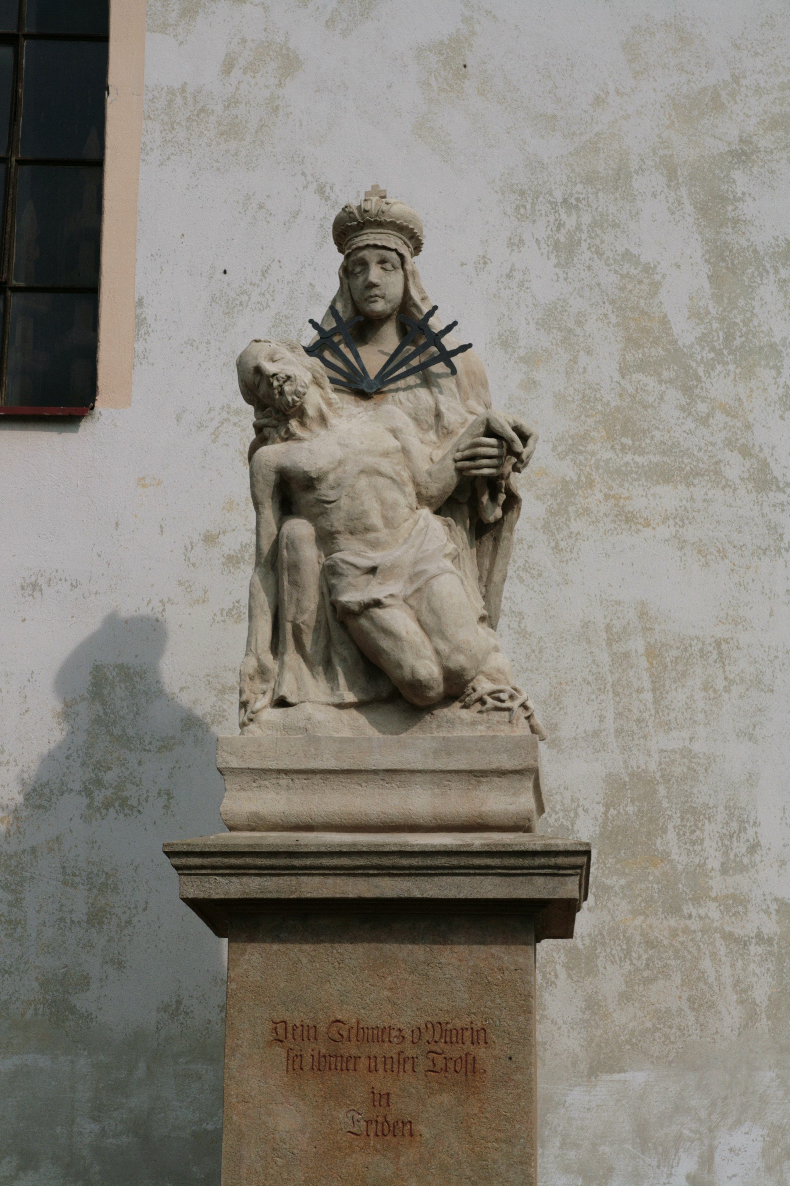 Obec Kubšice v okrese Znojmo, mezi Pohořelicemi a Moravským Krumlovem. Sousoší Piety u jižní strany kostela Panny Marie Bolestné.